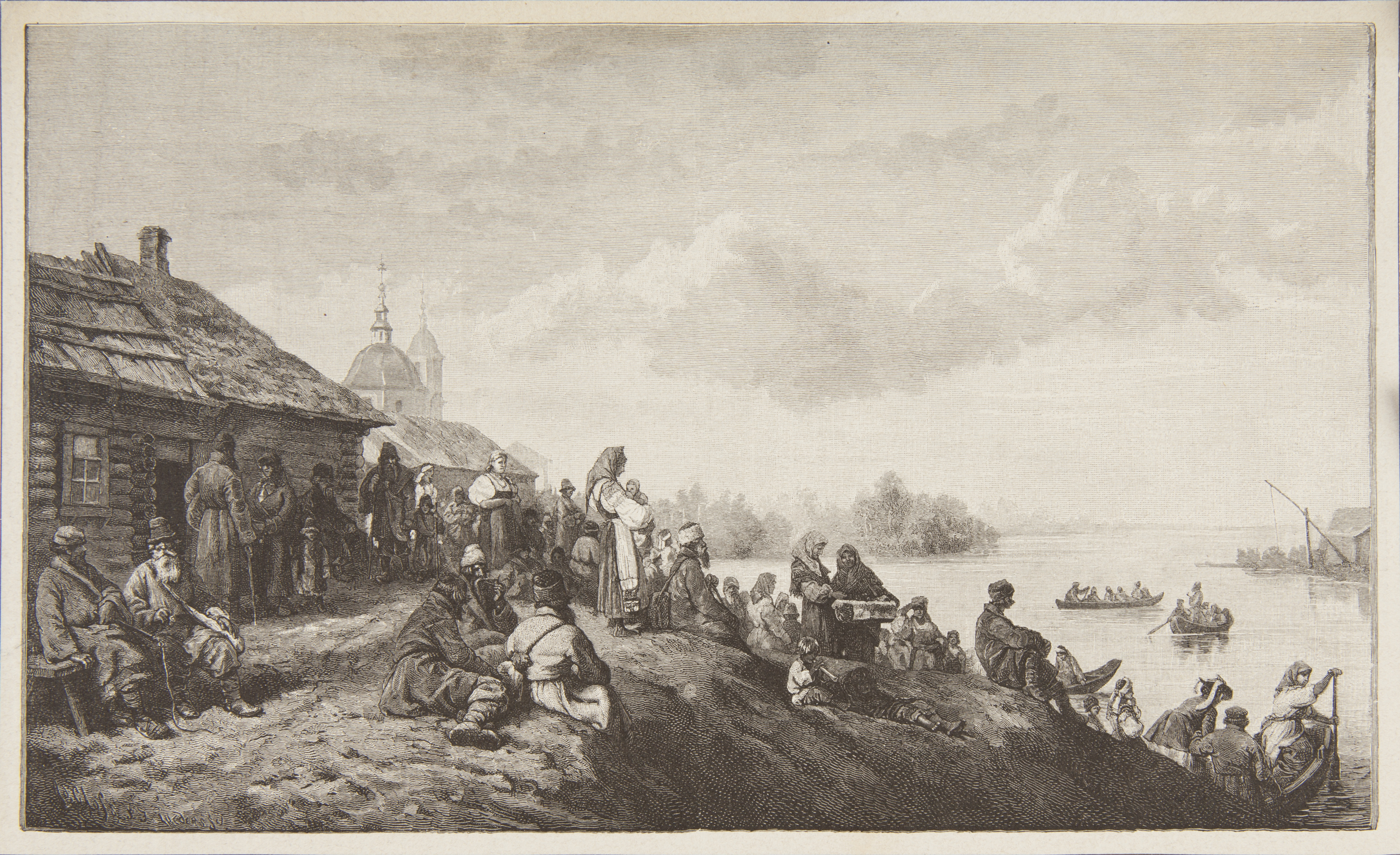 Беларуская (тарашкевіца): Дарагабуж (Darahabuž), рака Дняпро (Dniapro)